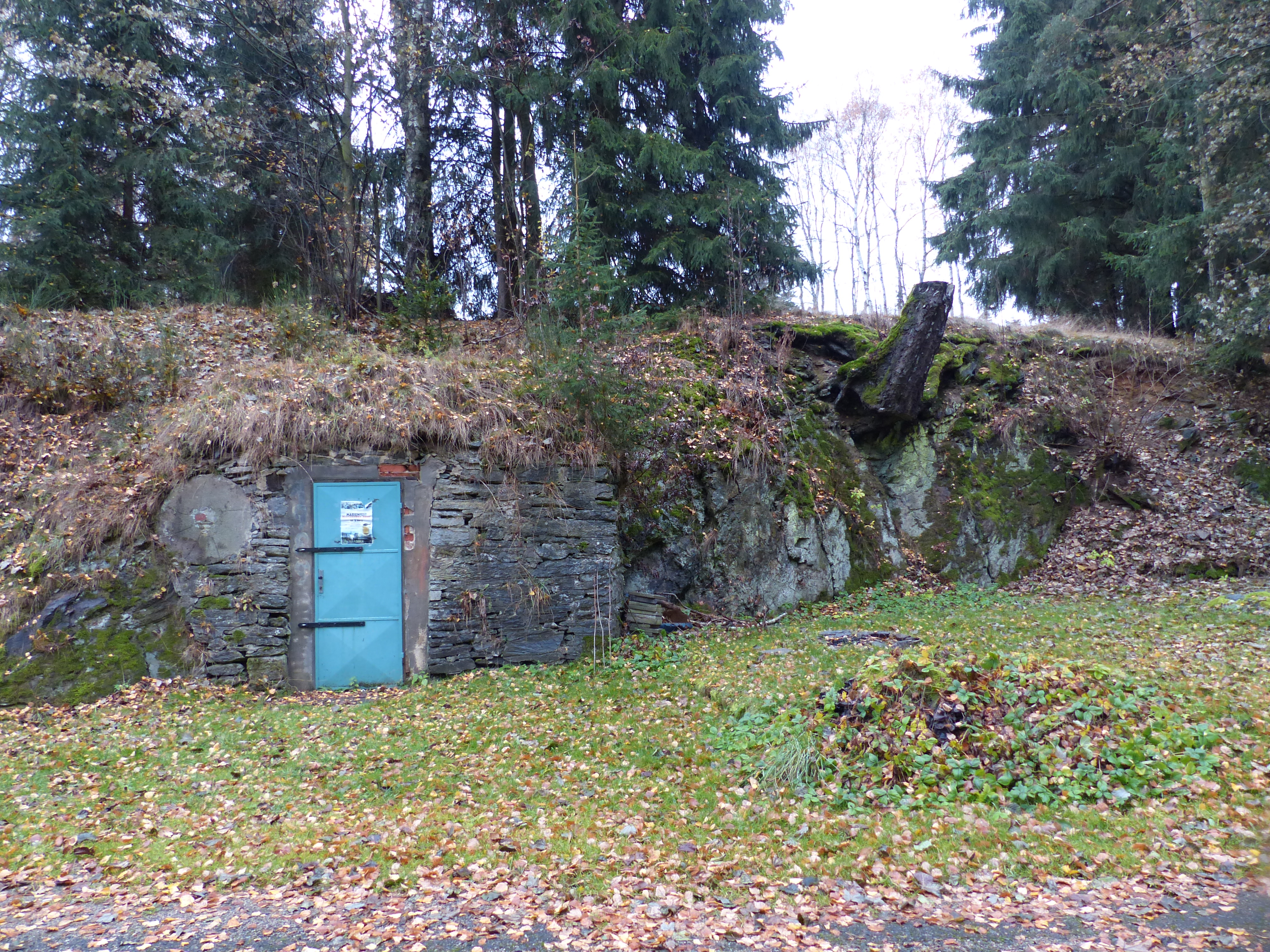 Dreiländereck